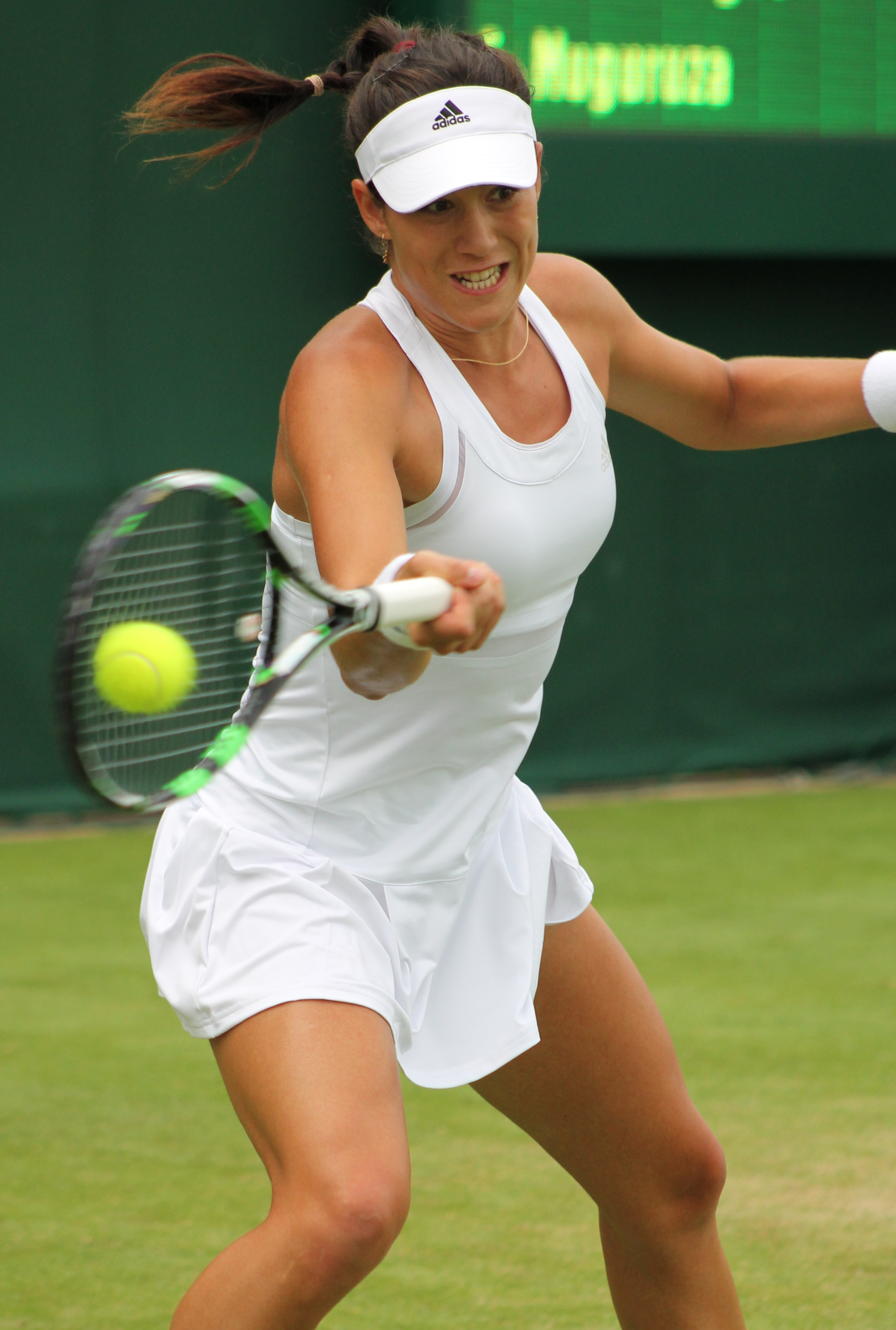 Muguruza WM14 (13)